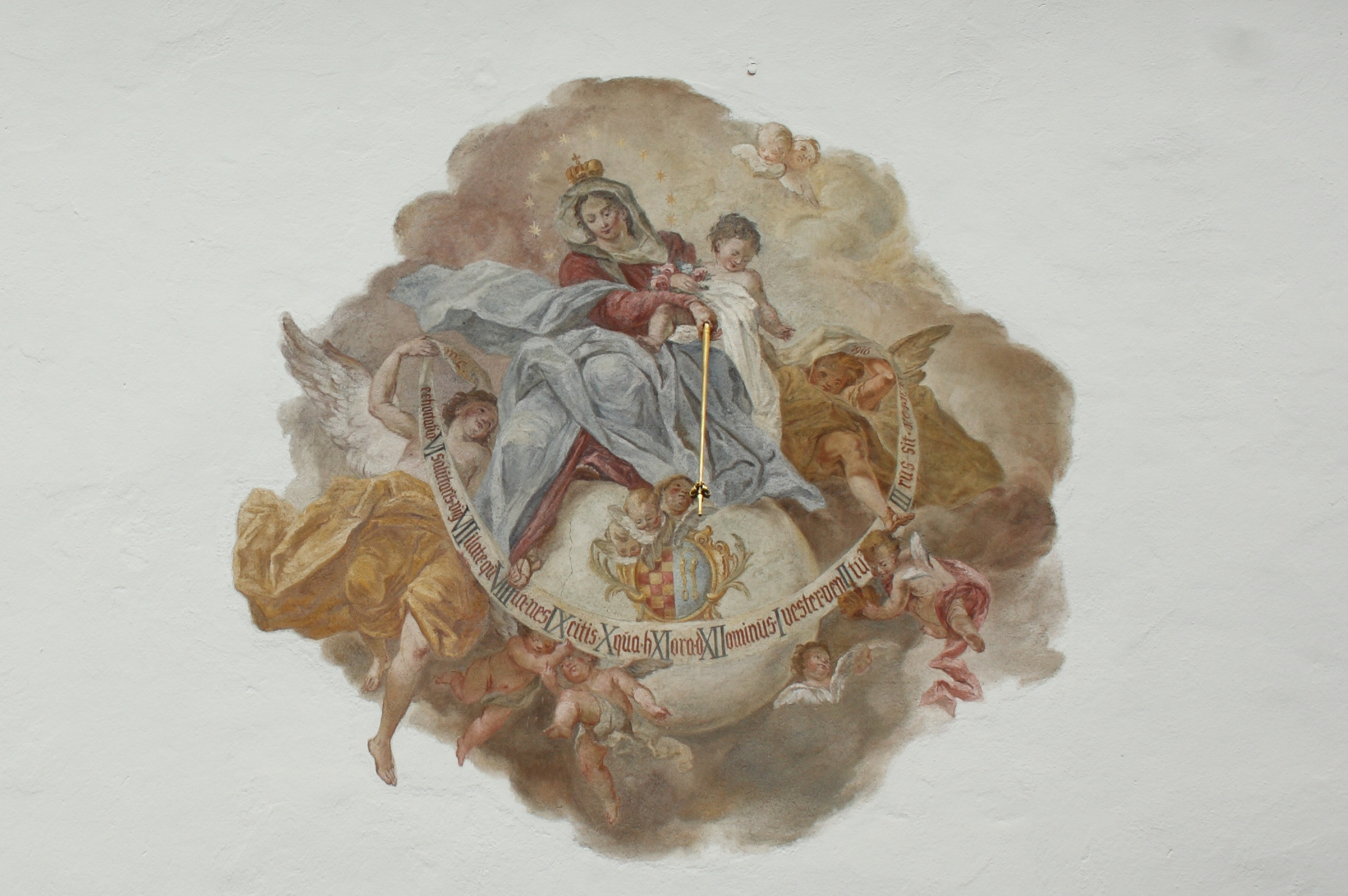 Katholische Wallfahrtskirche Mariä Himmelfahrt in Buggenhofen, einem Ortsteil von Bissingen im Landkreis Dillingen an der Donau (Bayern), Sonnenuhr von 1976, Wandmalerei, Darstellung: Maria Himmelskönigin